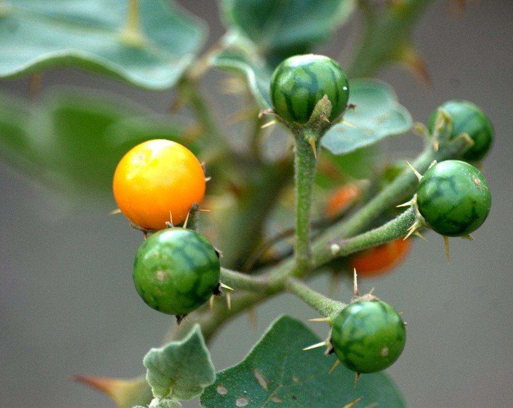 Solanum xanthocarpum കണ്ടകാരി ചുണ്ട